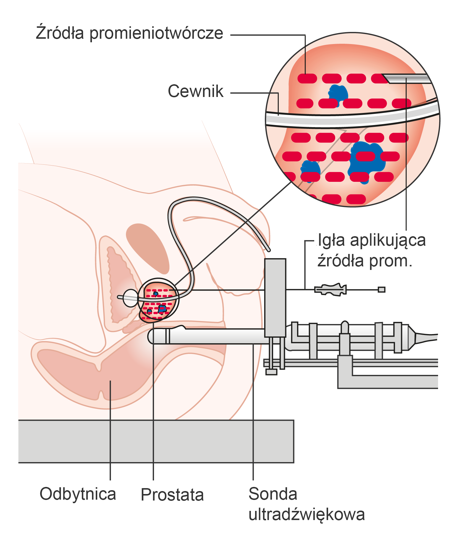 Brachyterapia o niskiej mocy dawki